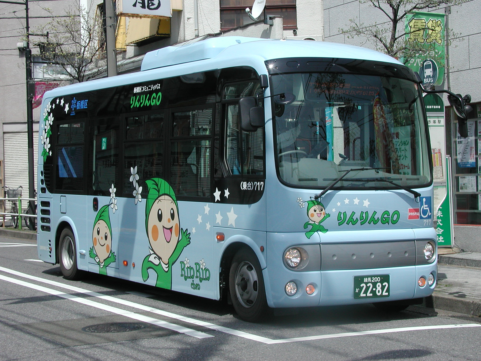 「板橋区コミュニティバス『りんりんGO』」専用車両（日野・ポンチョロングボディ：BDG-HX6JLAE/国際興業志村営業所所属：社番・717） 下赤塚駅バス停にて